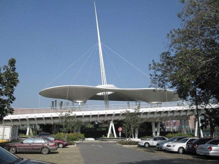 高雄市左營區翠華路自行車天橋，PVC膜結構，又稱翠華之雲，為典型PVC膜結構型式的代表。